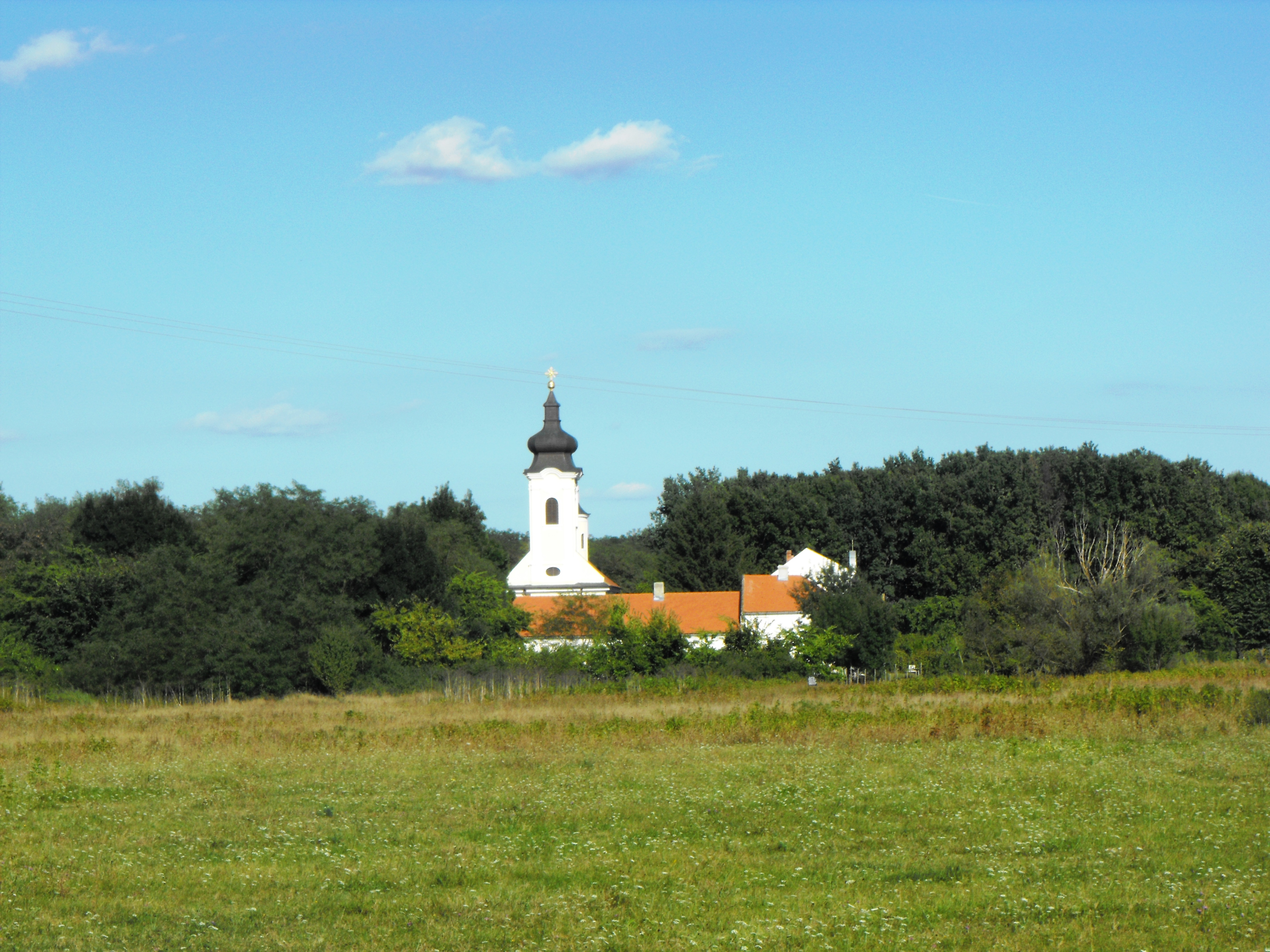 Mânăstire ortodoxă sârbă situată la 48 km de Timişoara şi 61 km de Reşiţa. situată în satul cu acelaşi nume (Mănăstire), com. Birda, la 2 km de DN 58B Reşiţa - Timişoara